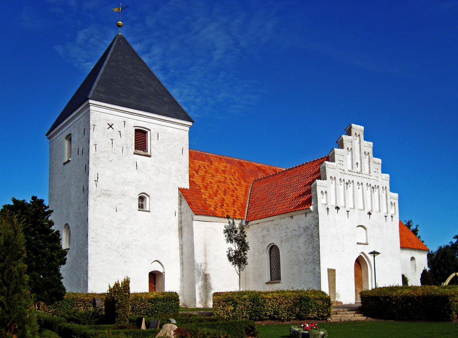 fra sydvest